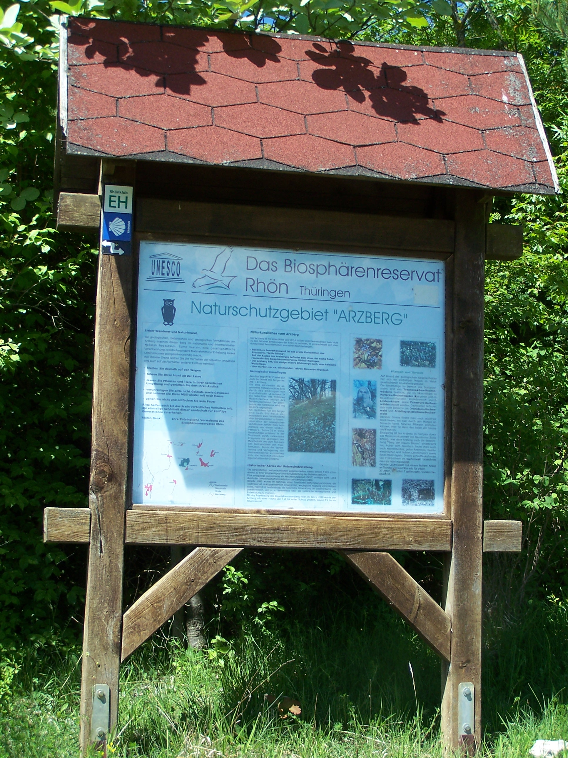 Ansichten und Impressionen aus dem Geisaer Stadtteil Otzbach.